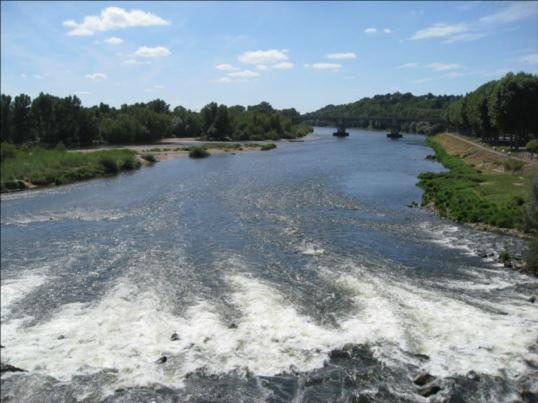 La Loire, plus long fleuve de France avec environ 1.014 kilomètres, arrose Nevers un peu avant le milieu de son cours. C'est à Nevers que s'y jettent ses affluents de l'Allier et de la Nièvre.